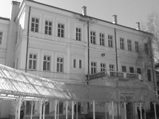 Горната гимназија во Битола, од мобилниот мој :)